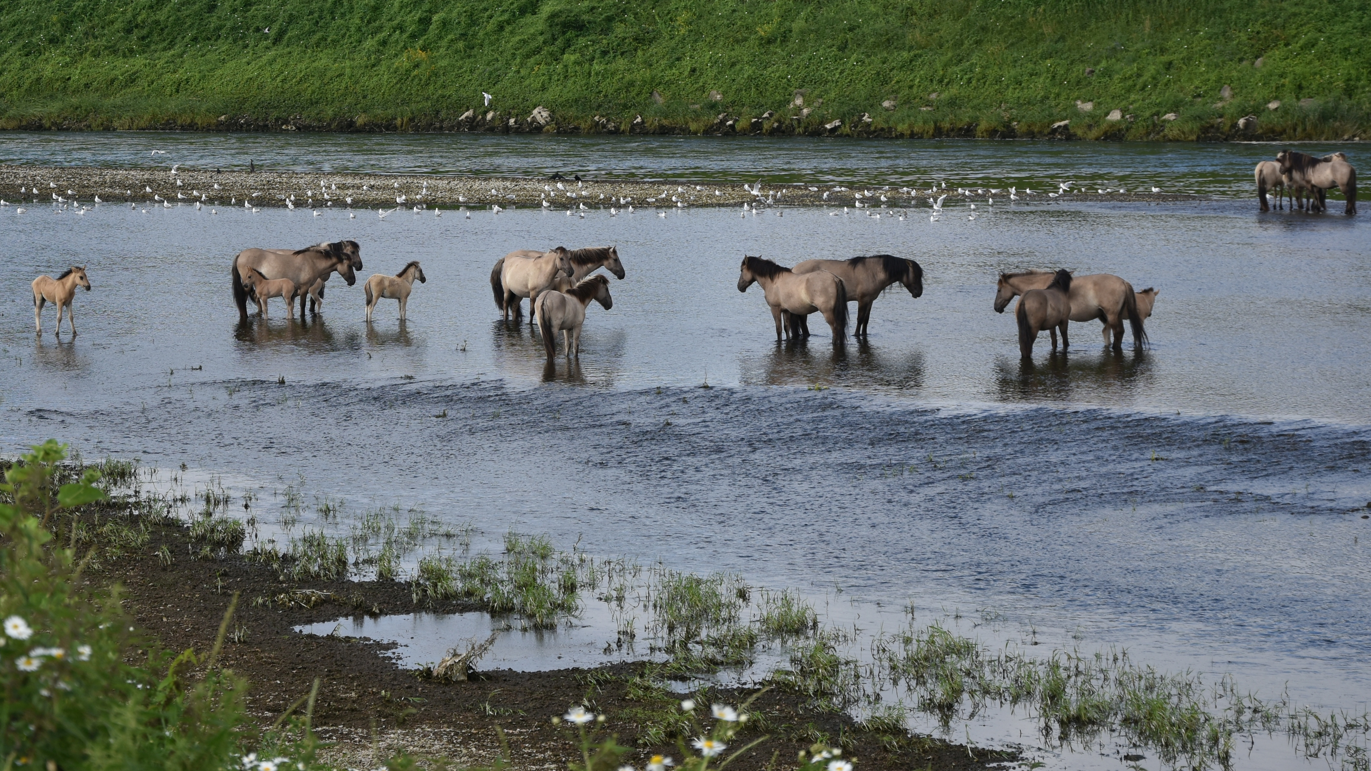 Konik in de Maas (Maaseik) 20-06-2018 10-08-19